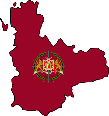 Imagen Wikiproyecto Valladolid